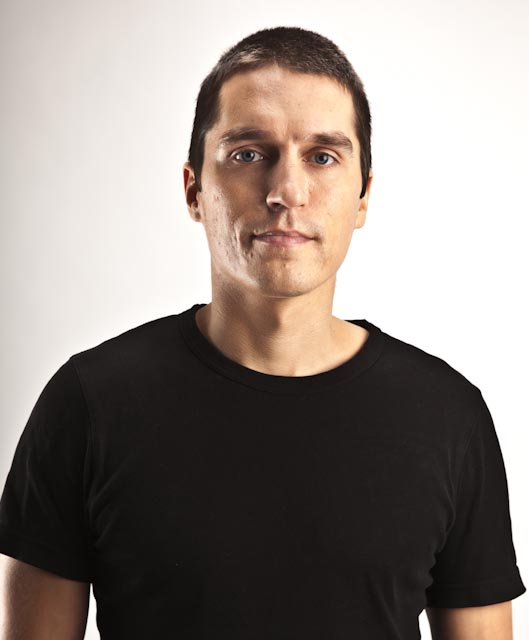 Petri Luukkainen